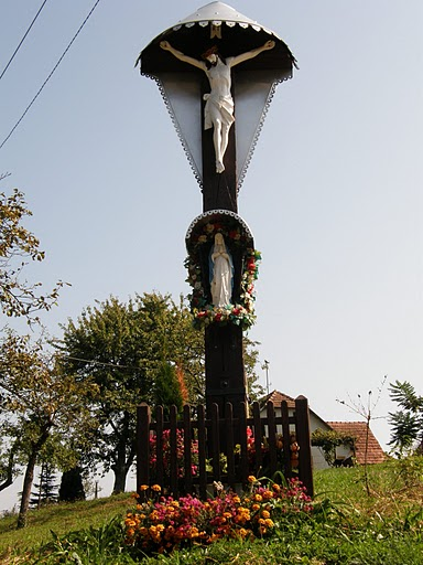 Kereszt Felsőszölnökről (Vas megye)